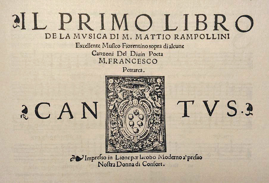 Title page of Matteo Rampollini's Primo libro de la musica (c. 1560)